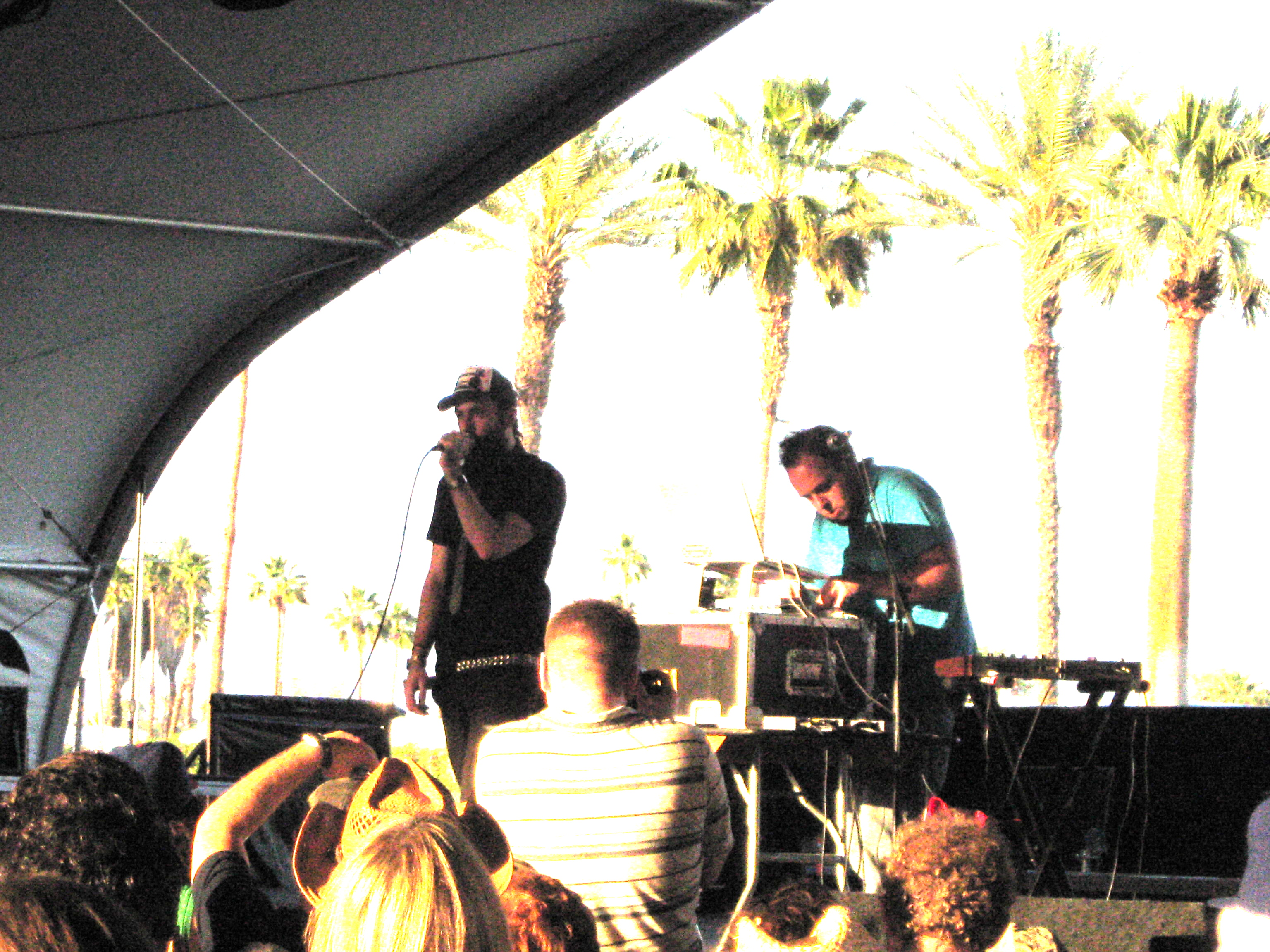 Dan Le Sac Vs Scroobius Pip